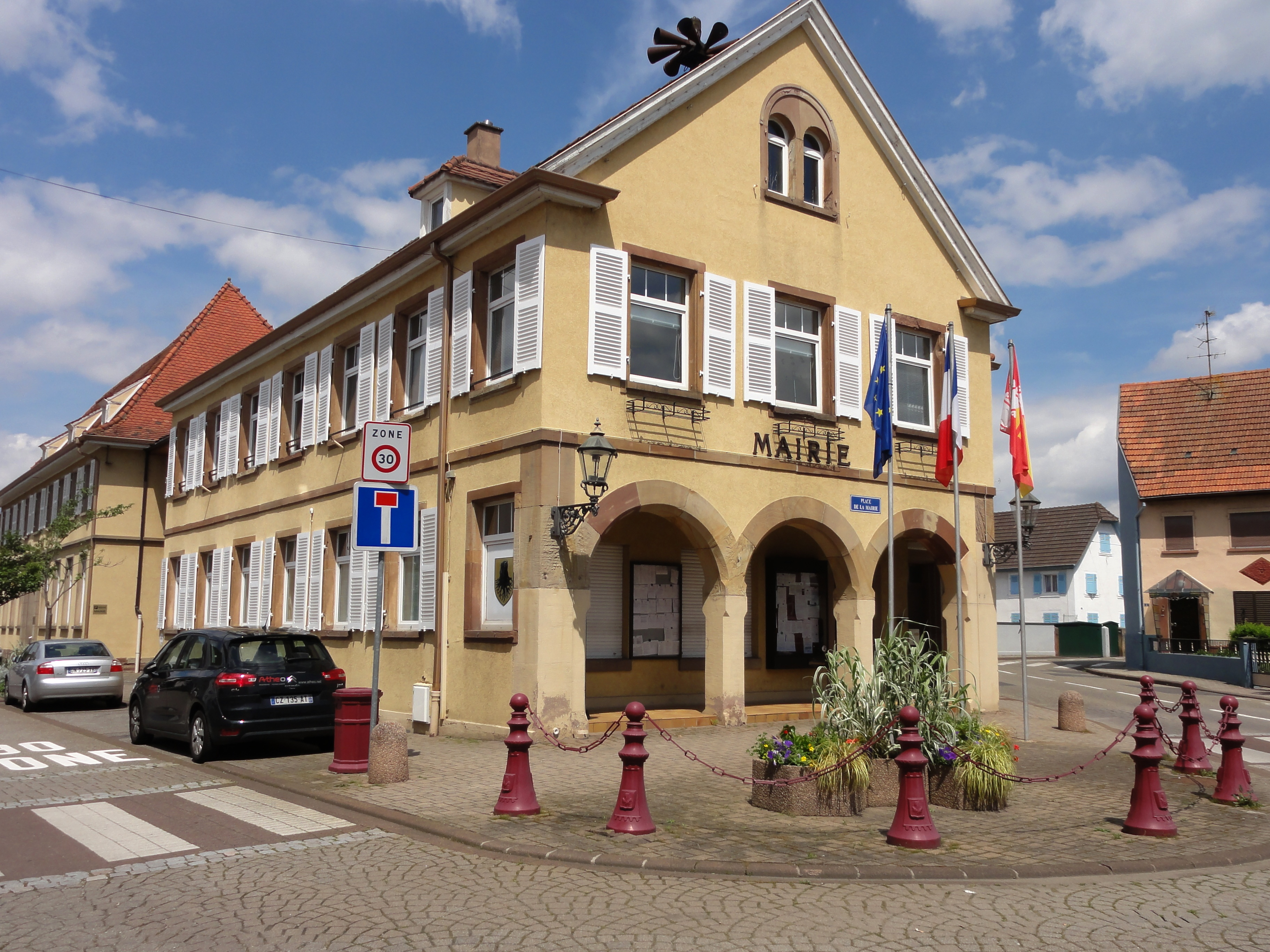 Alsace, Bas-Rhin, Holtzheim, Mairie.